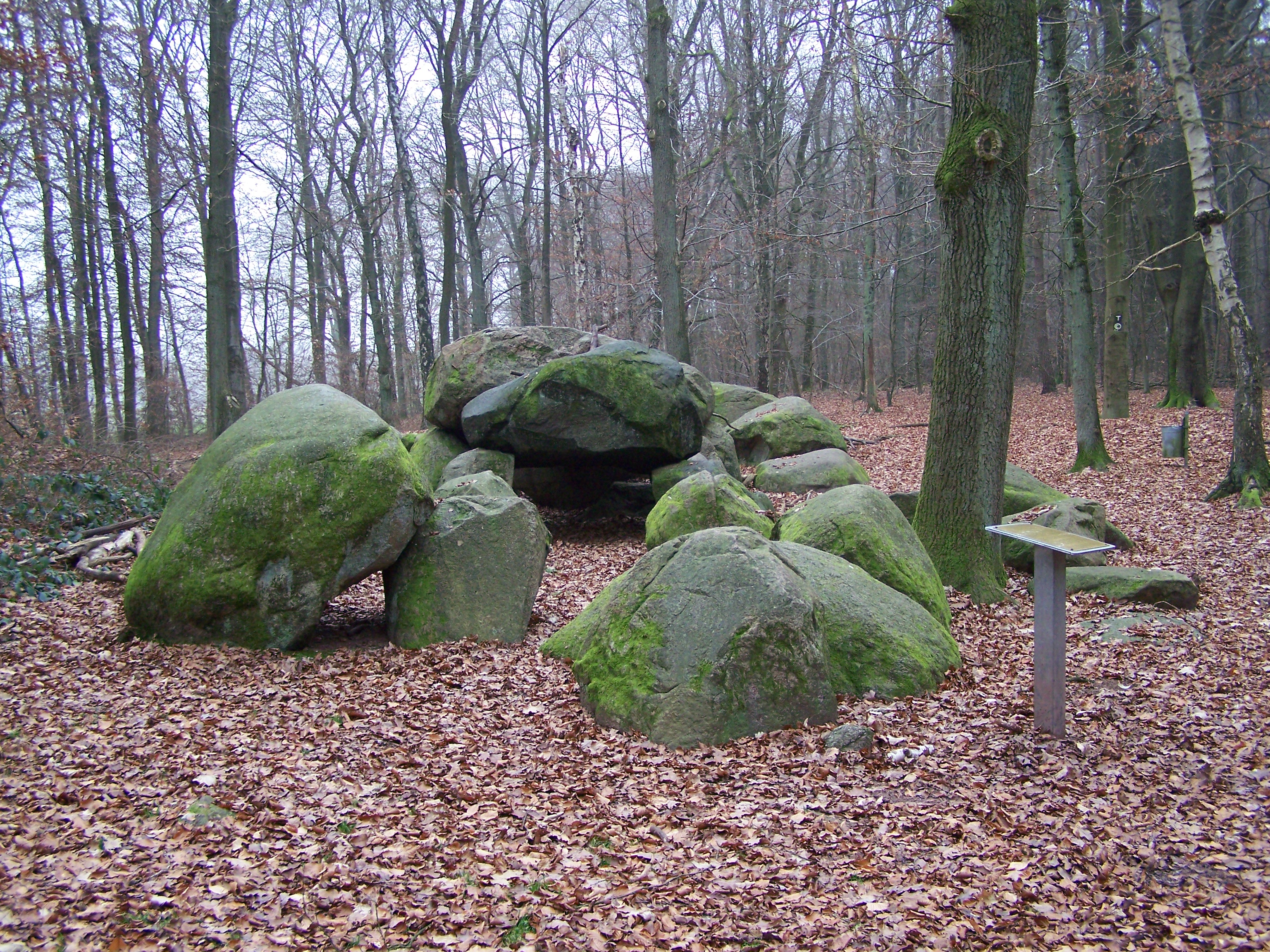 Große Sloopsteine in Wersen; ein Großsteingrab